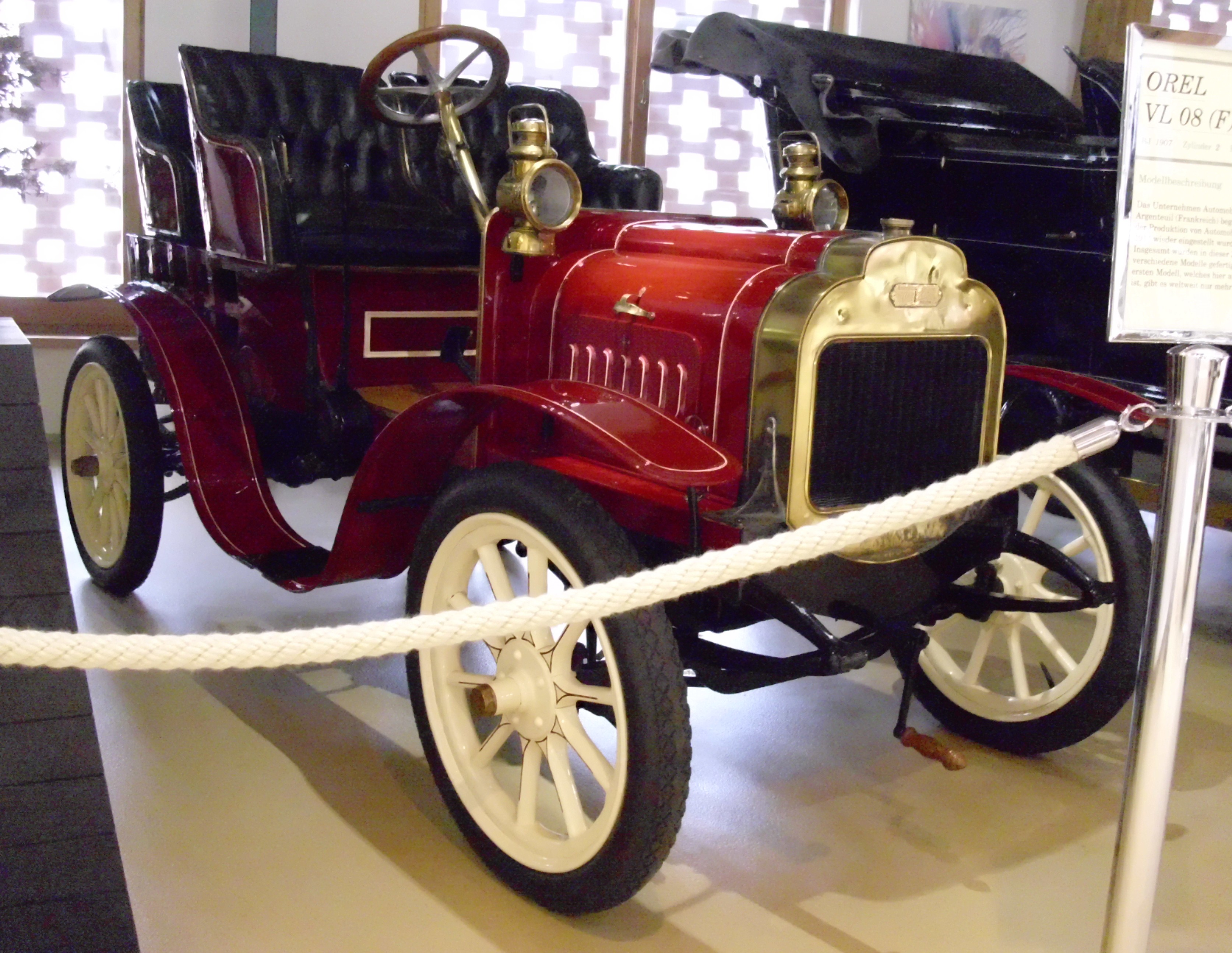 Orel 8 CV VL 08 1907 im Seppenbauer Automuseum in Sankt Salvator